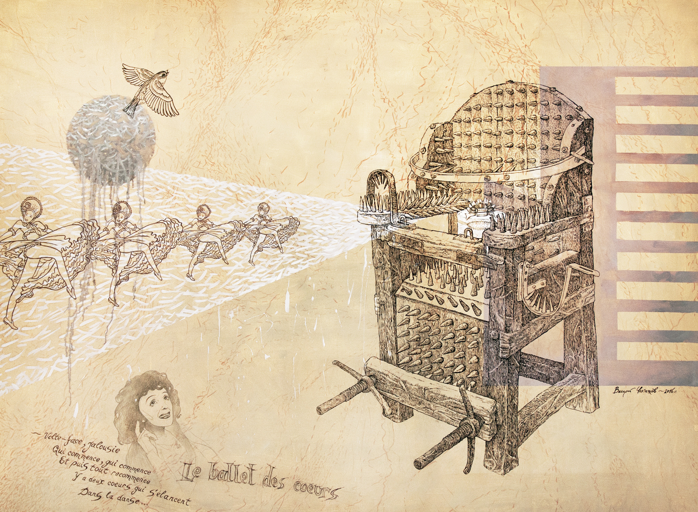 Э. ПИАФия. Холст, масло, 195Х145 см. 2016 г